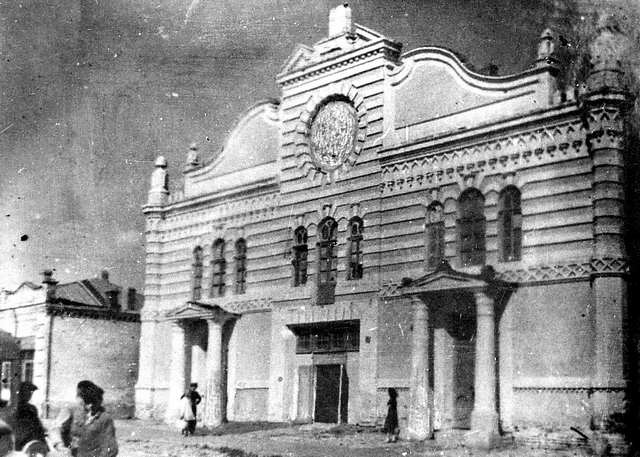 Беларуская (тарашкевіца): Бабруйск. Вялікая сынагога